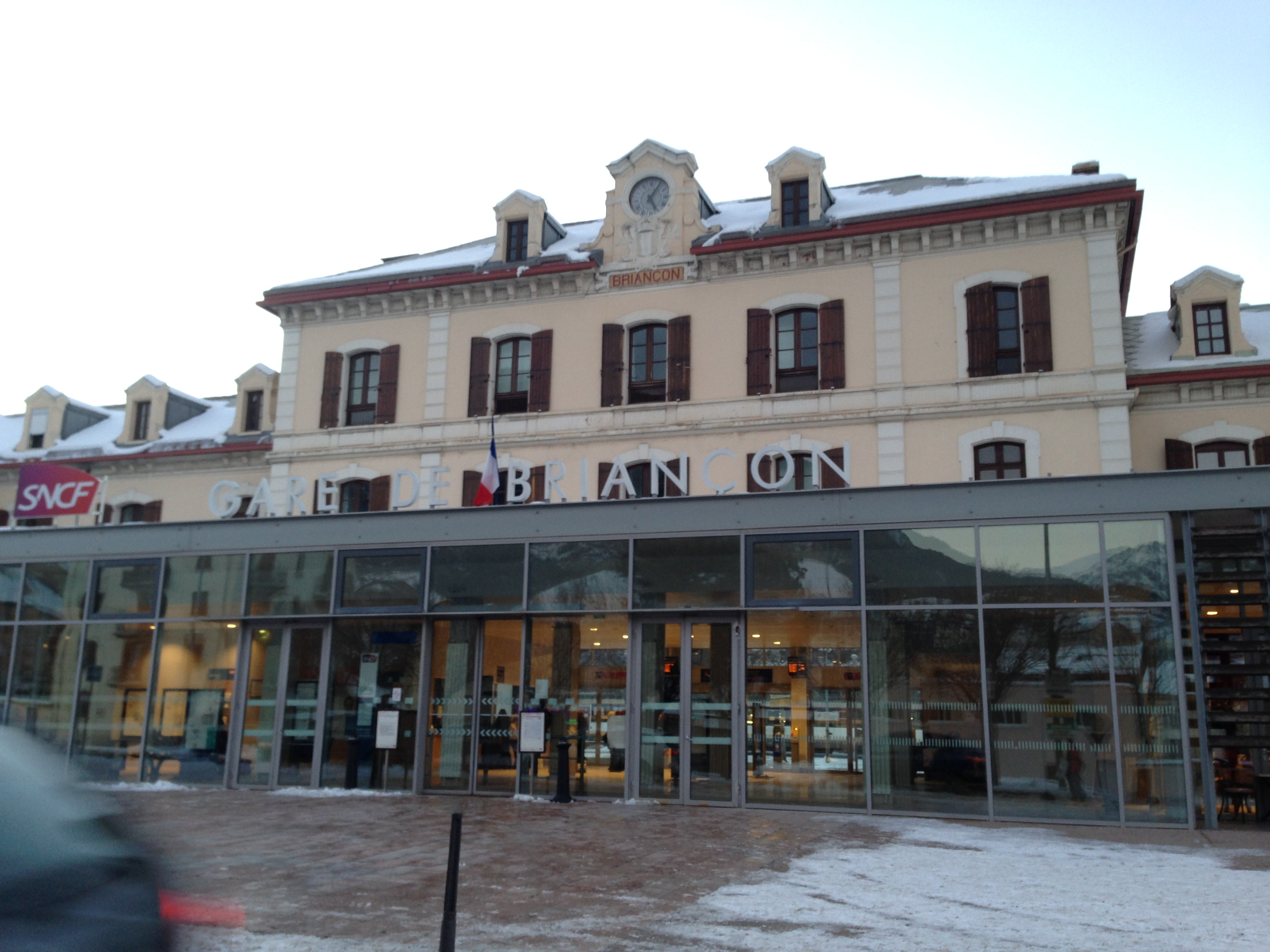 Gare de Briançon